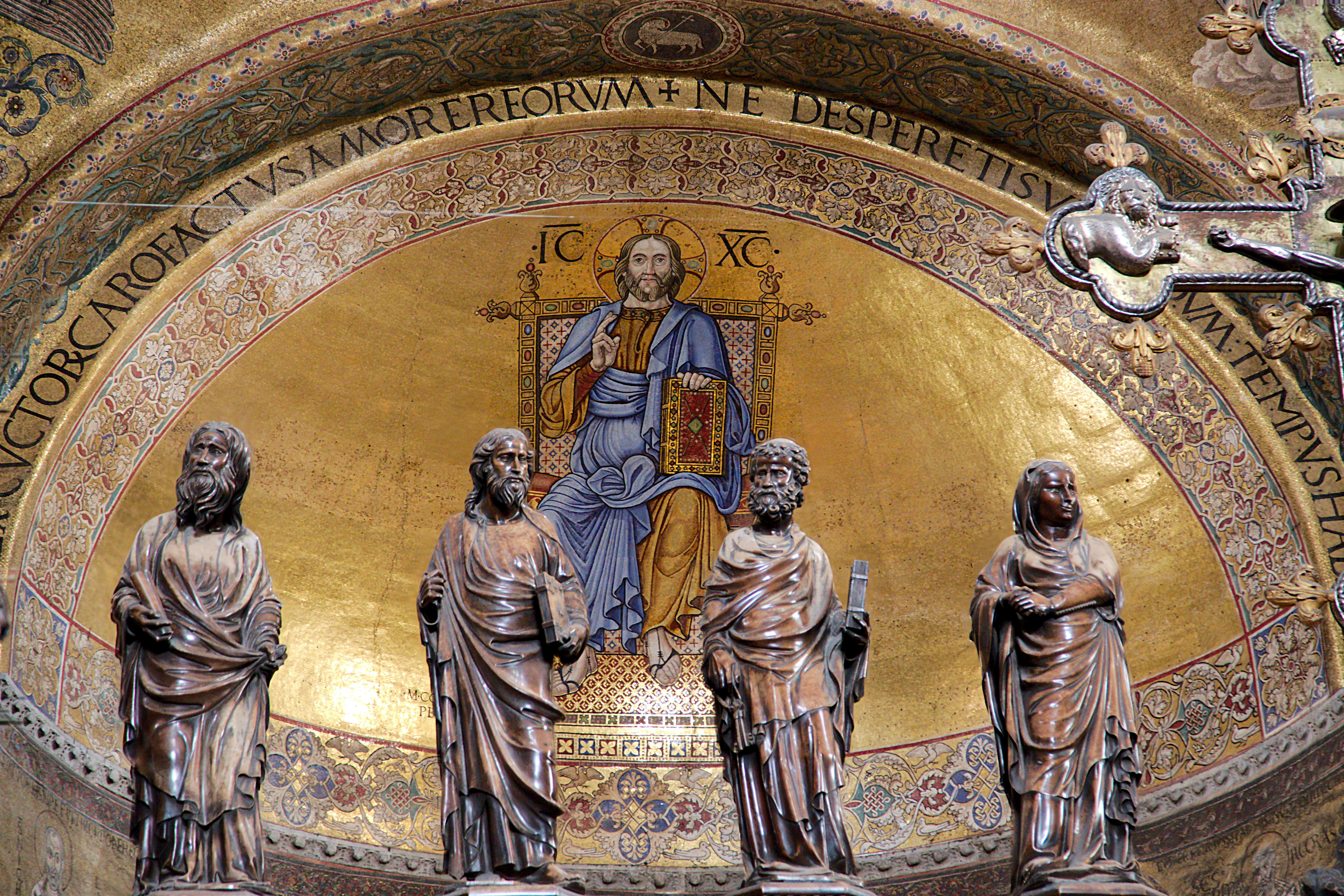 Mosaik in der Hauptapsis des Markusdoms Venedig Christus Pantokrator und die Schutzpatrone: Nicolaus, Petrus, Markus, Hermagor.